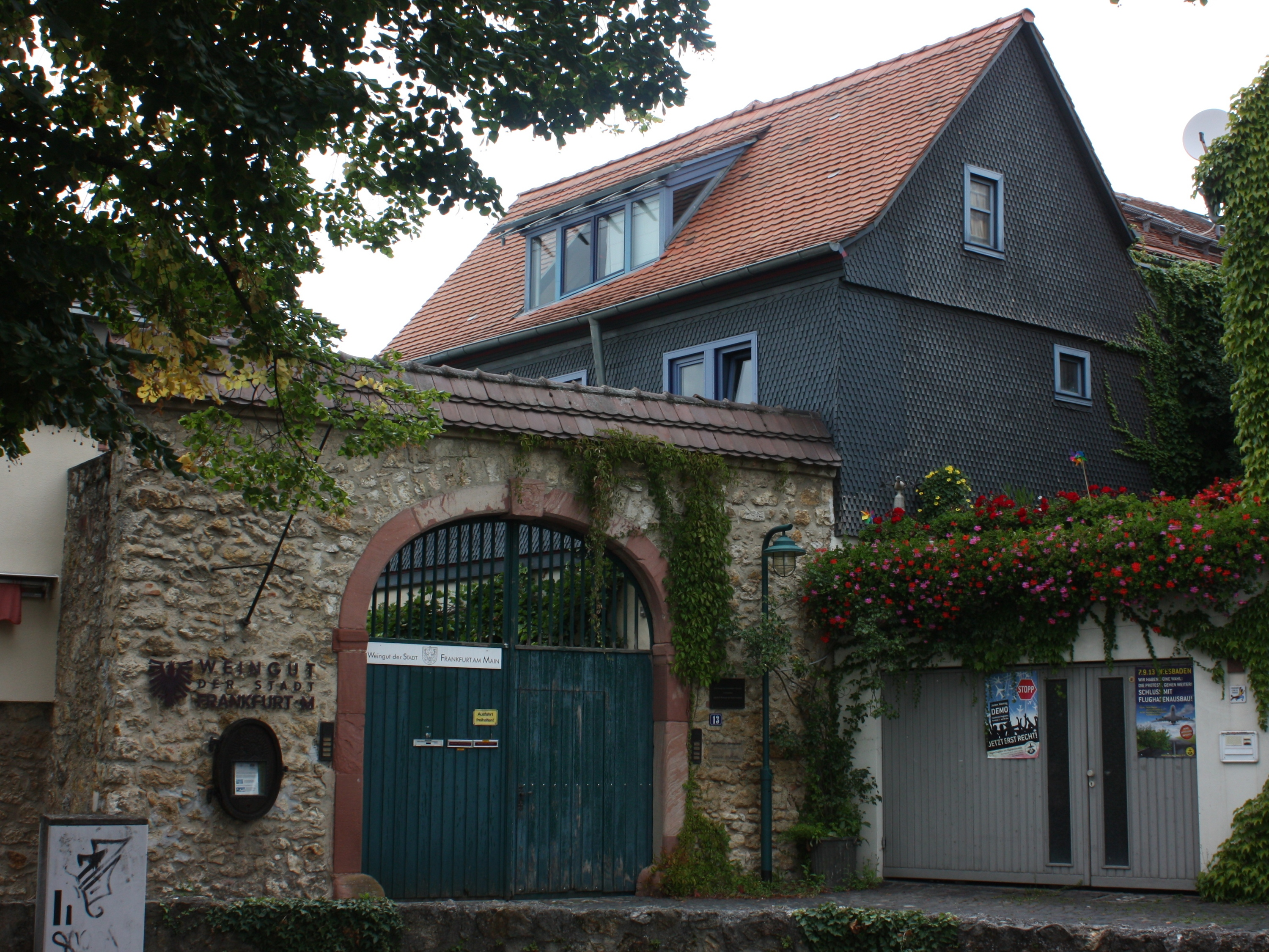 Hochheim, Hessen: Ehemaliger Hof des Frankfurter Karmeliterkosters, Heute Weingut der Stadt Frankfurt